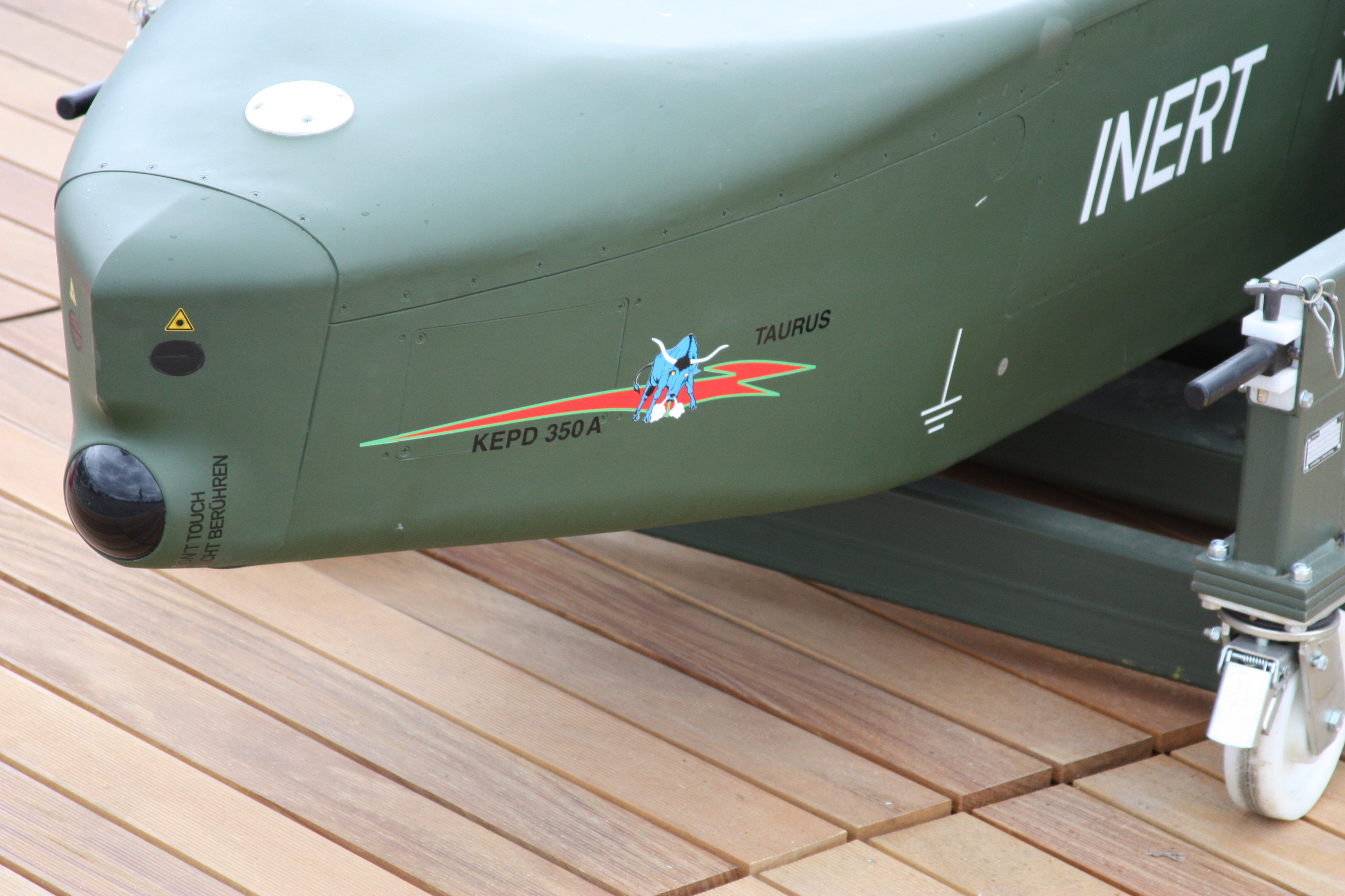 ILA 2010, am Samstag aufgenommen, meist erhöht von einer Leiter fotografiert